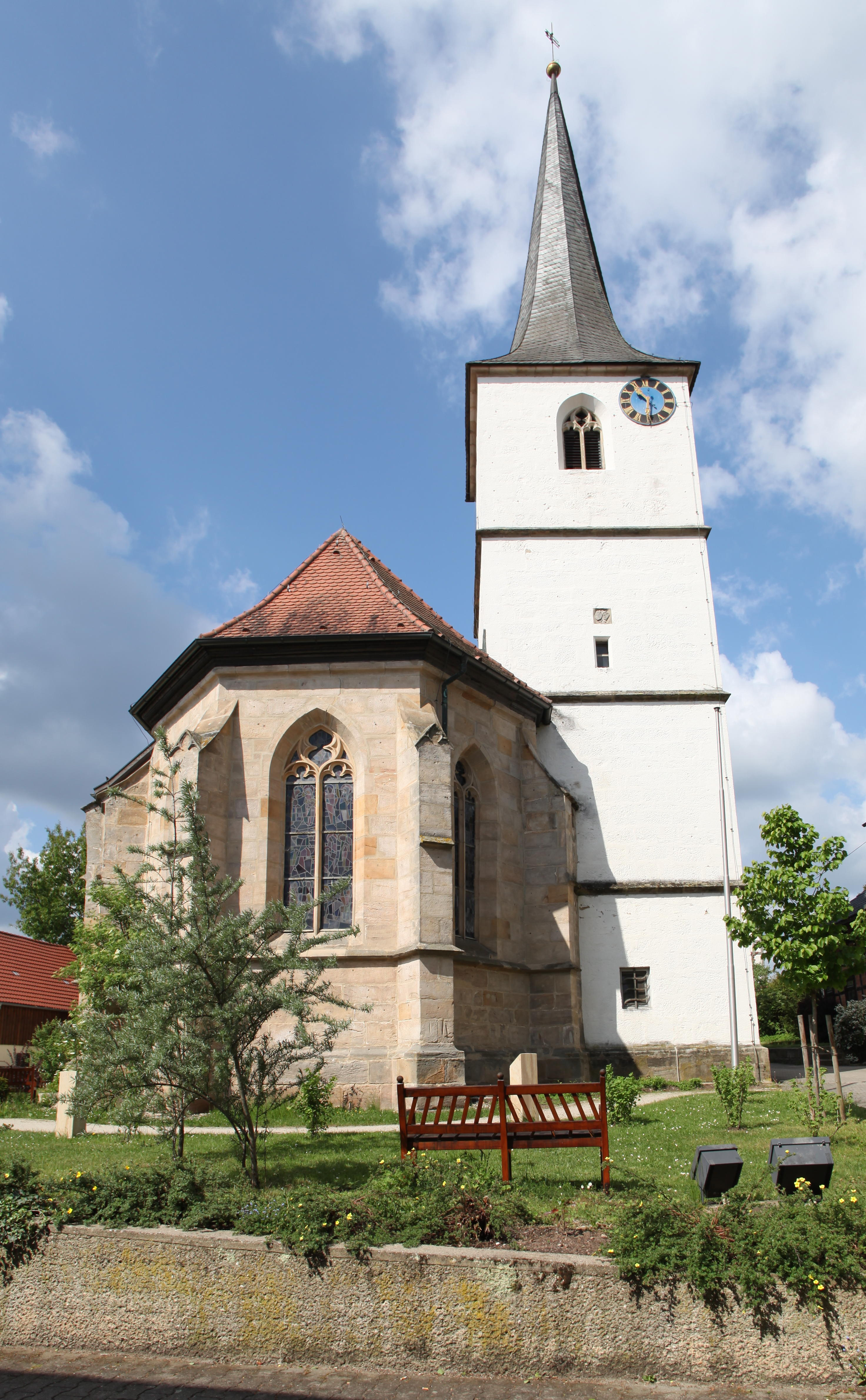 Ev. Johanneskirche, Gemünda, Landkreis Coburg